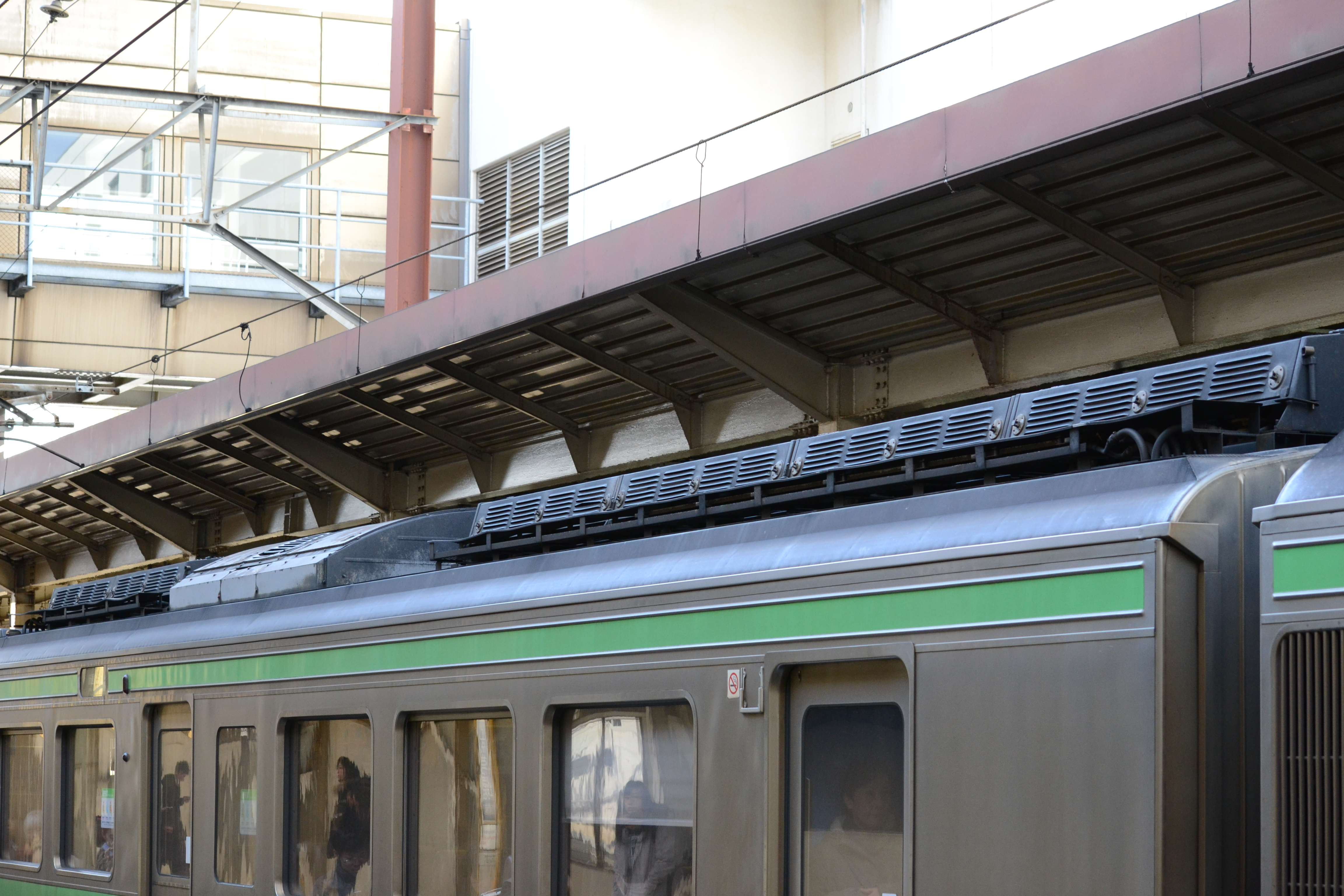 721系電車1-4次車の屋根上に装備されている発電ブレーキ用の抵抗器